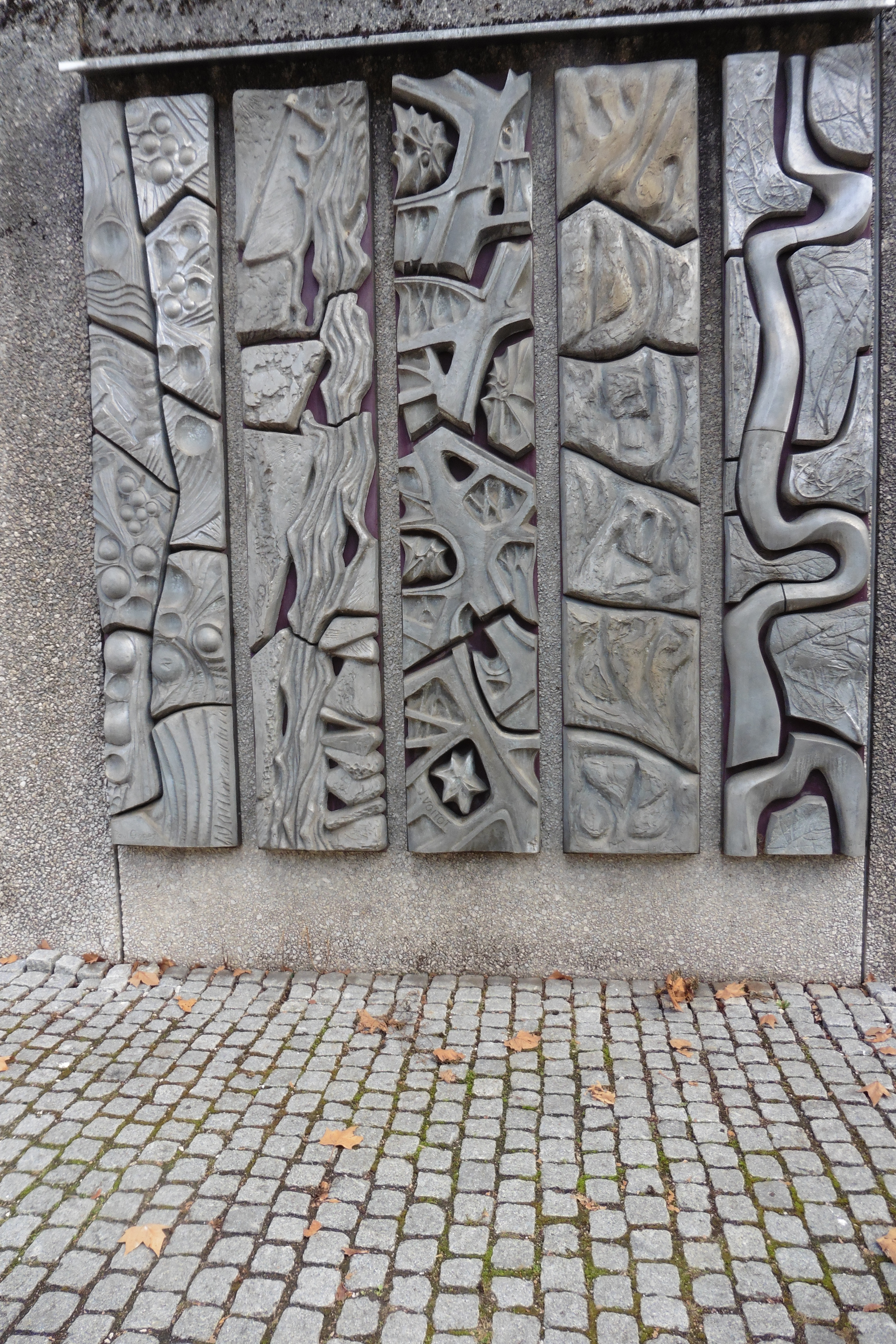 Fresque du parvis de l'Hotel de Police de Besançon. Oeuvre collective de 5 artistes : Paul Gonez, Georges Oudot, Jacques Voitot, Bernard Jobin, et Erny Gilles